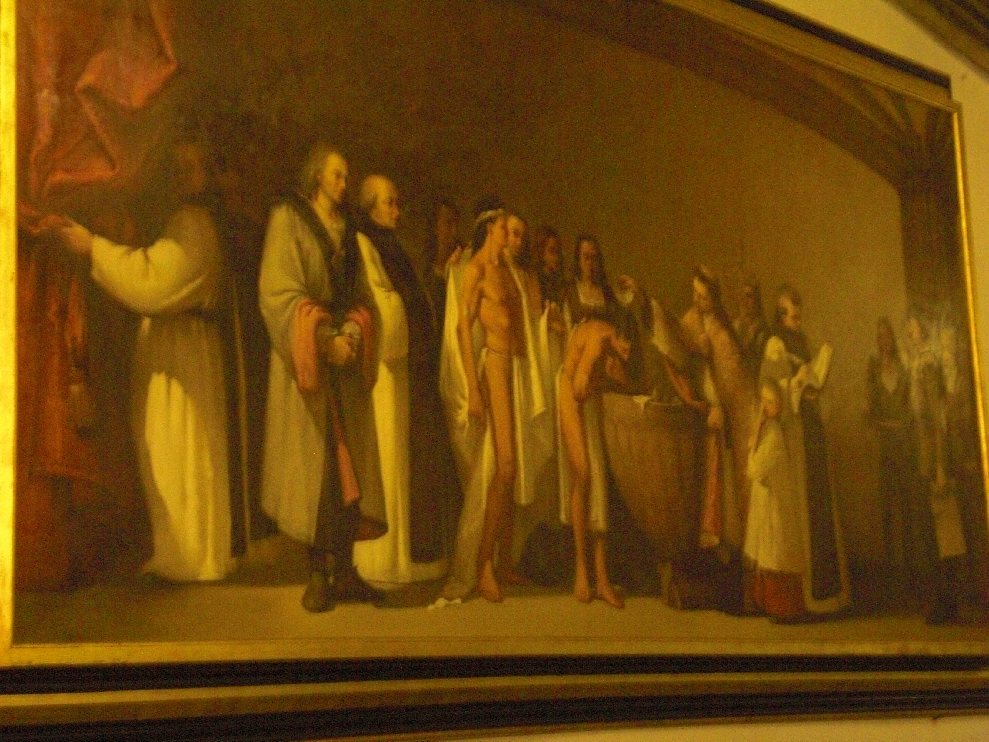 Bapto de la indianoj alportitaj de Kolumbo en Guadalupe